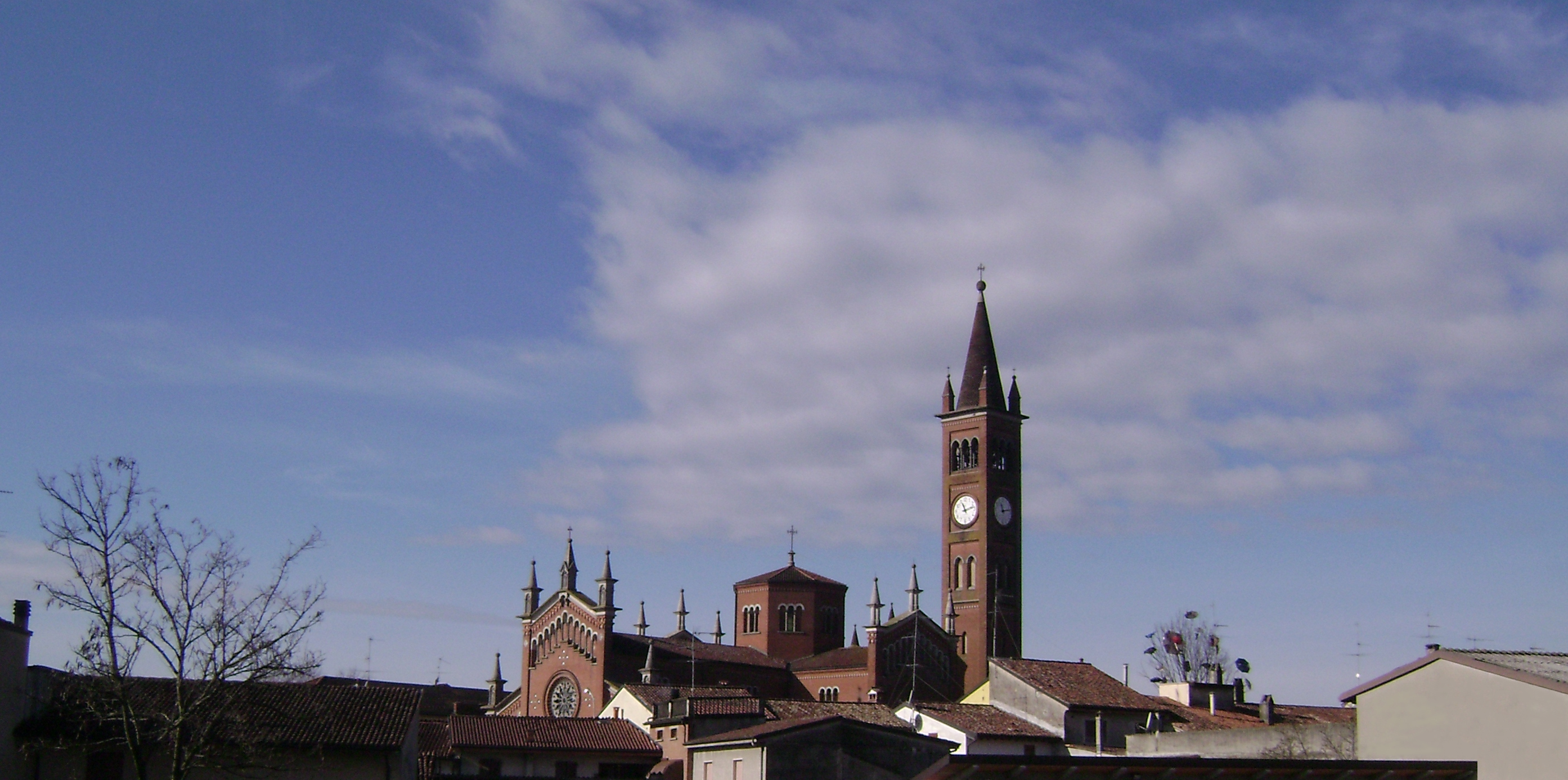 Panoramo de Pescarolo ed Uniti, Lombardio (detalo de file:Pescarolo ed Uniti1.JPG)